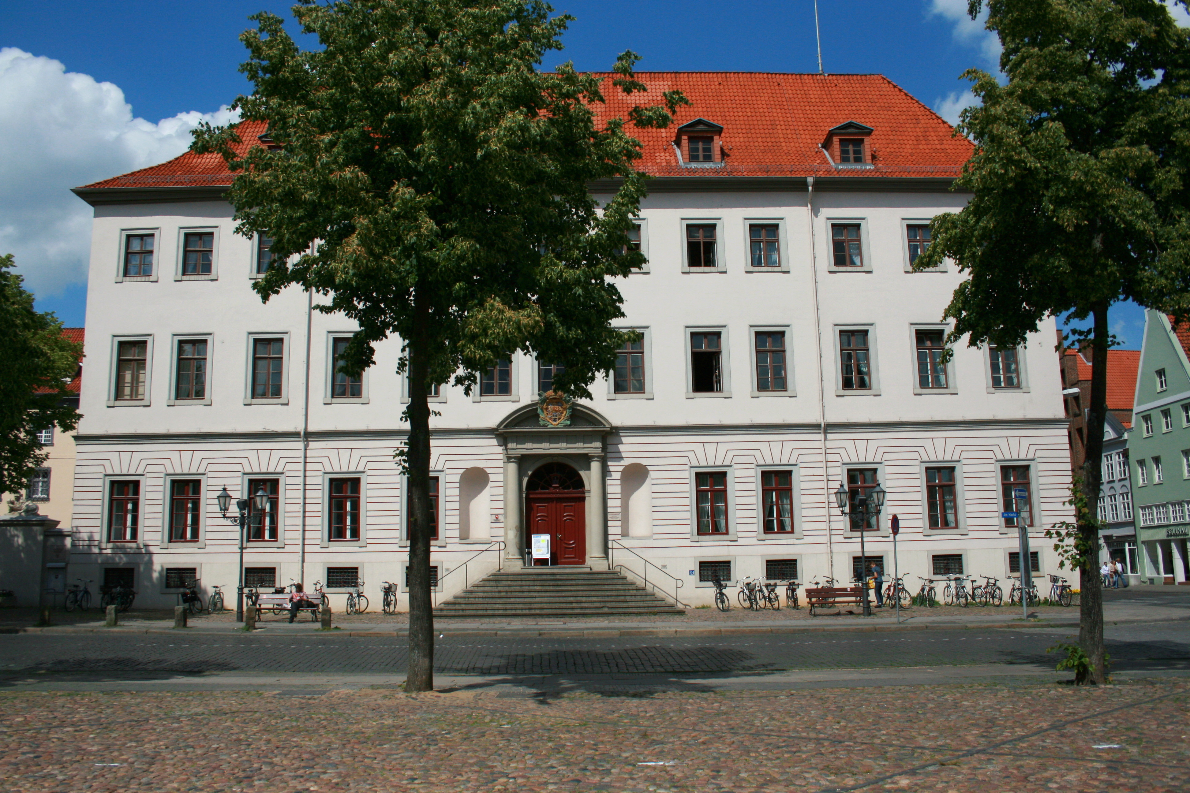 Landgericht, Am Markt in Lüneburg